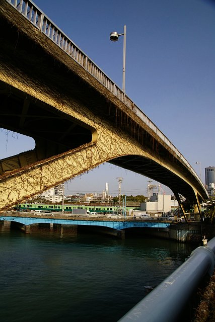 Osaka Bridge, Osaka City